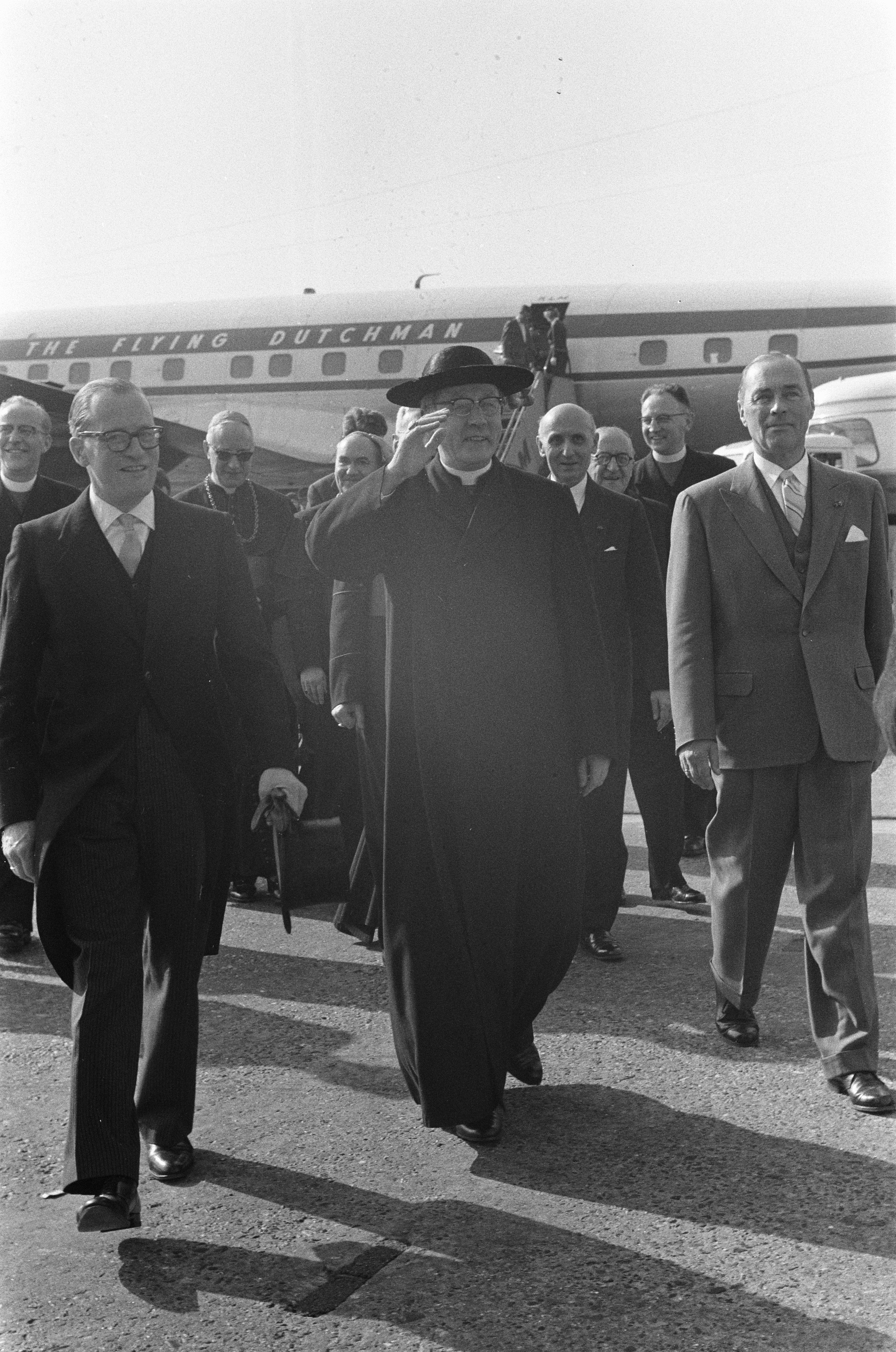 Collectie / Archief : Fotocollectie Anefo Reportage / Serie : [ onbekend ] Beschrijving : Aankomst kardinaal Alfrink uit Rome Datum : 7 april 1960 Locatie : Italië, Rome Trefwoorden : AANKOMST Persoonsnaam : Alfrink, Bernardus Fotograaf : Pot, Harry / Anefo Auteursrechthebbende : Nationaal Archief Materiaalsoort : Negatief (zwart/wit) Nummer archiefinventaris : bekijk toegang 2.24.01.05 Bestanddeelnummer : 911-1550